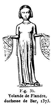 Yolande de Flandre